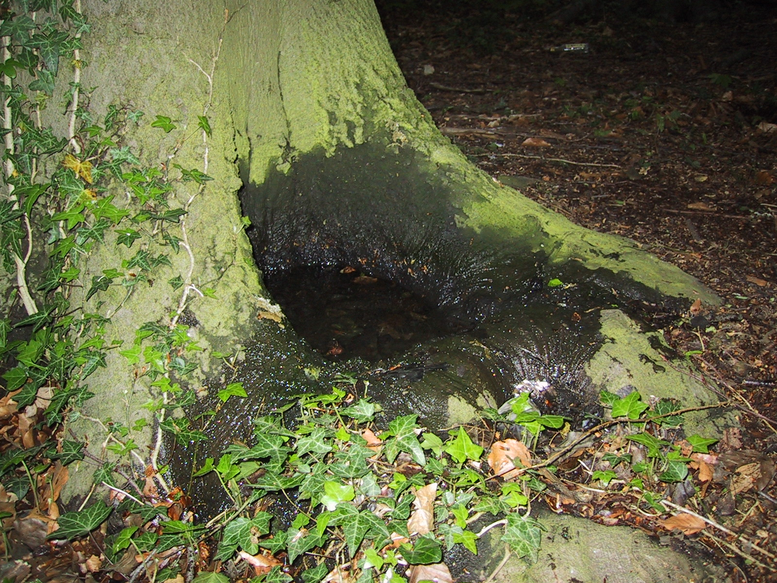 Dentrotelme à la base d'un tronc